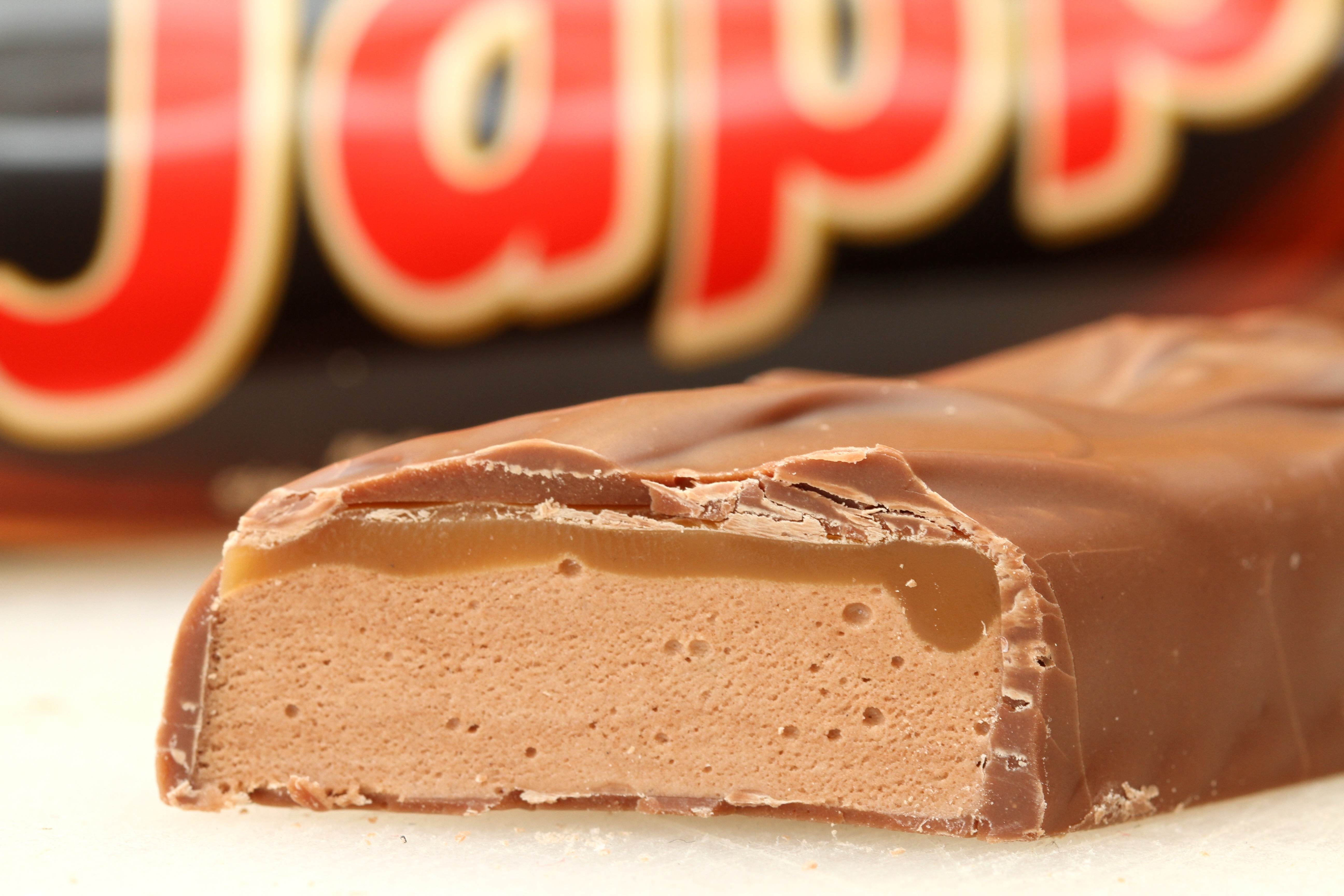 Sjokoladen Japp.